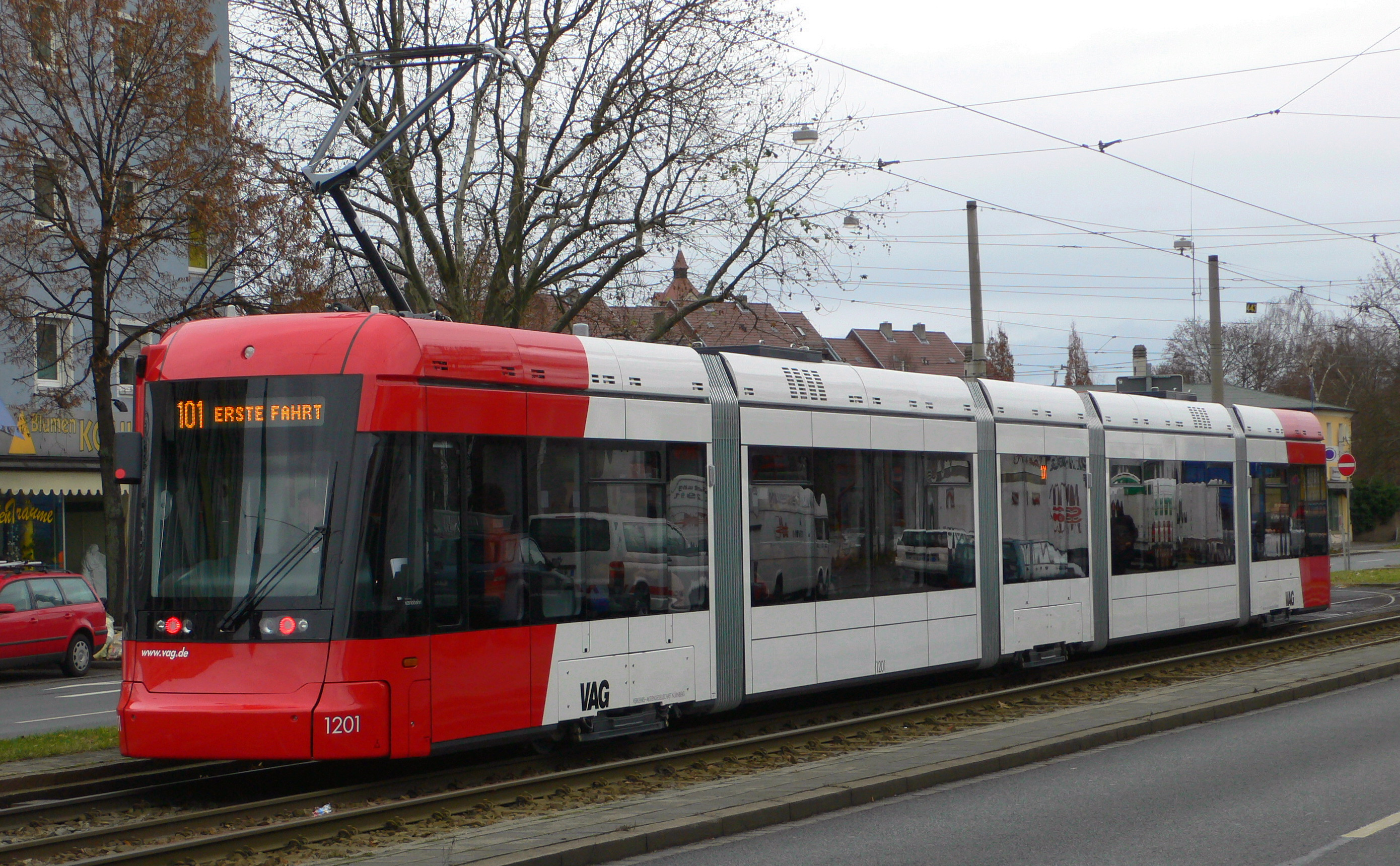 Triebwagen 1201 (Typ GTV6, Variobahn) der VAG Verkehrs-Aktiengesellschaft Nürnberg (VAG)